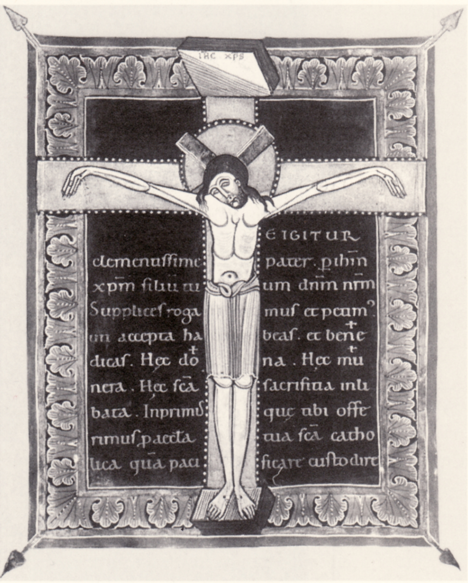 Evangeliar aus Mönchengladbach, Kölner Buchmalerschule, Anfang 11. Jahrhundert, Fol. 15v. Heute Universitätsbibliothek Freiburg Cod. 360a. Kreuzigungsdarstellung.